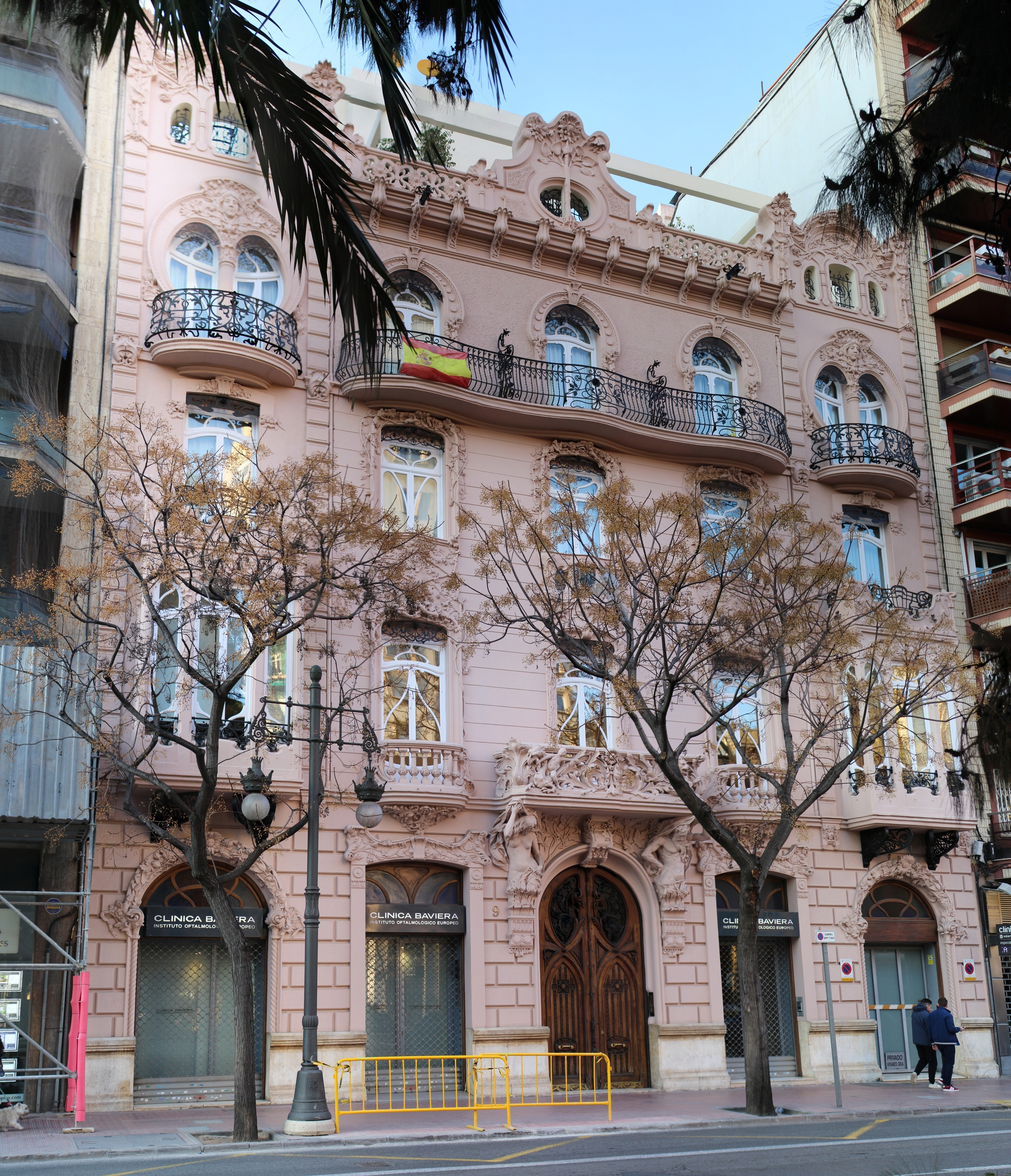 Casa Ortega de Manuel Peris Ferrando (1906) en la Gran Vía Marqués del Turia número 9 de Valencia